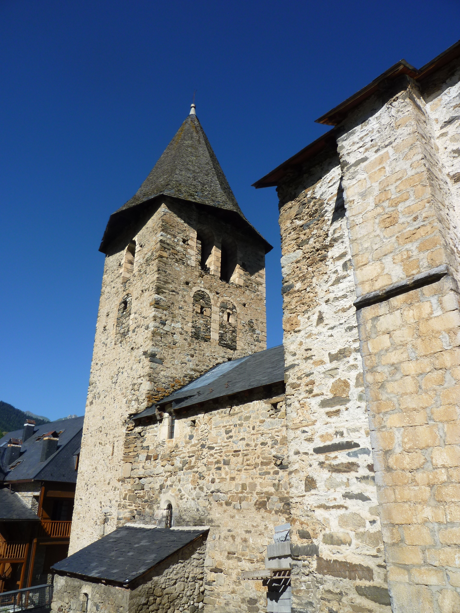 Esglesia parroquial de Sant Pere d'Escunhau (Vielha e Mijaran): vista des del sud